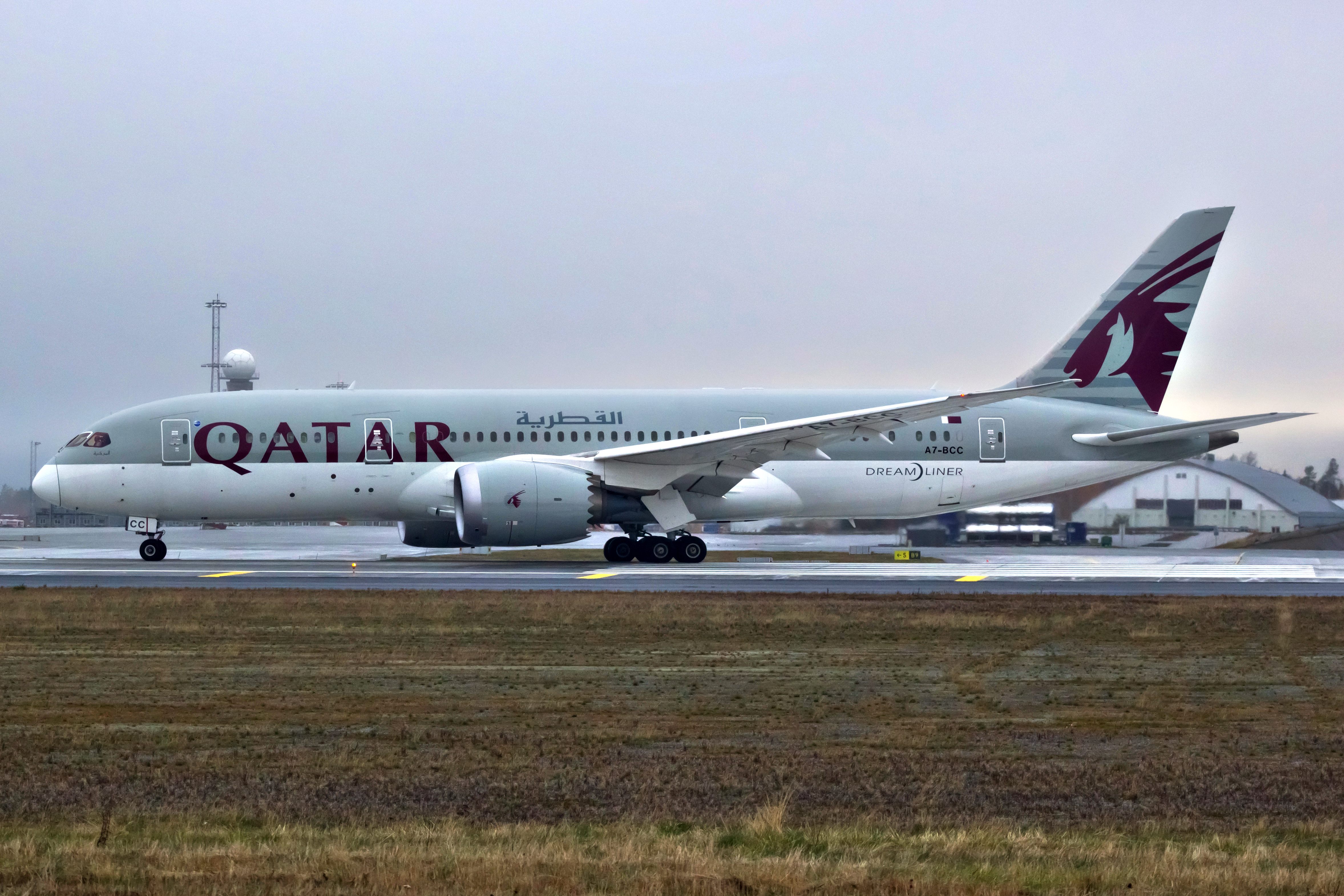 Boeing 787 de Qatar a piques de despegar do aeroporto de Oslo, Gardermoen.